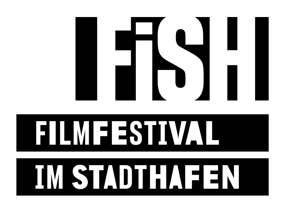 Offizielles Logo des FiSH Filmfestival im Stadthafen